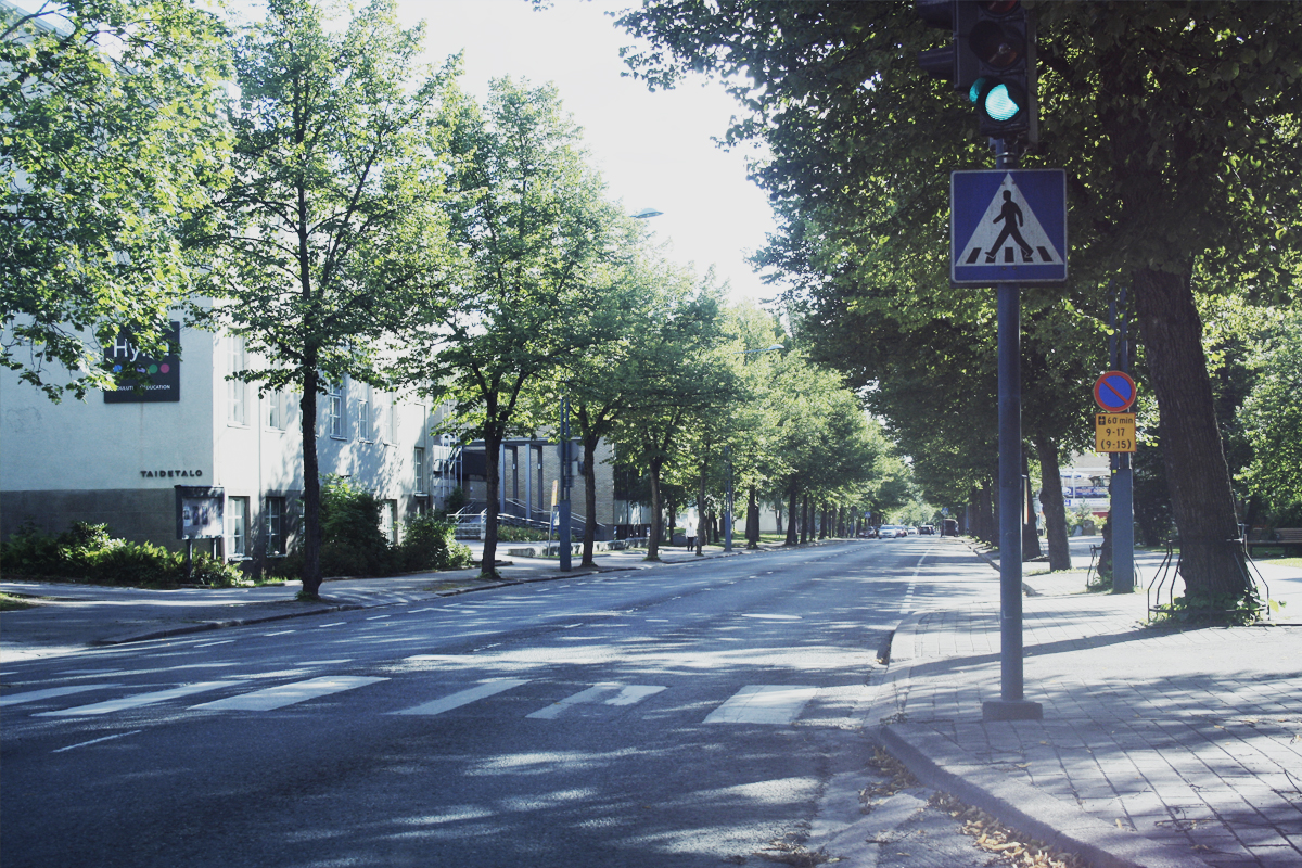 Kuvaa Uudenmaankadulta, kuvattu elokuussa 2014